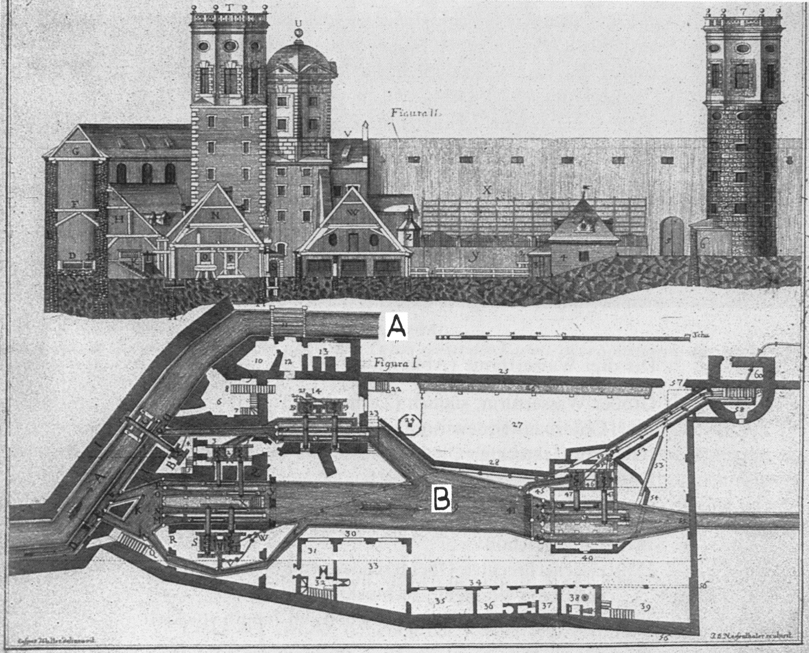 Das Wasserwerk am Roten Tor in Augsburg. Kupferstich von Nessenthaler nach einer Zeichnung von Caspar Walter (Ausschnitt). Gezeigt ist der Große und Kleine Wasserturm (links) sowie der Kastenturm (rechts), vom Brunnenmeisterhof (Osten) aus gesehen. Unten die Draufsicht des gesamten Wasserwerks am Roten Tor. Der Buchstabe A bezeichnet den Lochbach, der vor dem Oberen Brunnenmeisterhaus vorbeifließt und ab hier Vorderer Lech heißt. B ist der Brunnenbach, dessen Wasser durch mehrere Öffnungen in der Stadtmauer in den Brunnenmeisterhof geleitet wird, die Wasserräder antreibt und in die Wassertürme hochgepumpt wird.